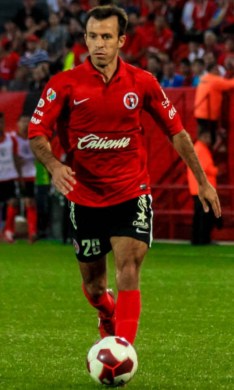 Diego Olsina en el Xolos de Tijuana vs Jaguares de Chiapas. 31 de agosto de 2012.